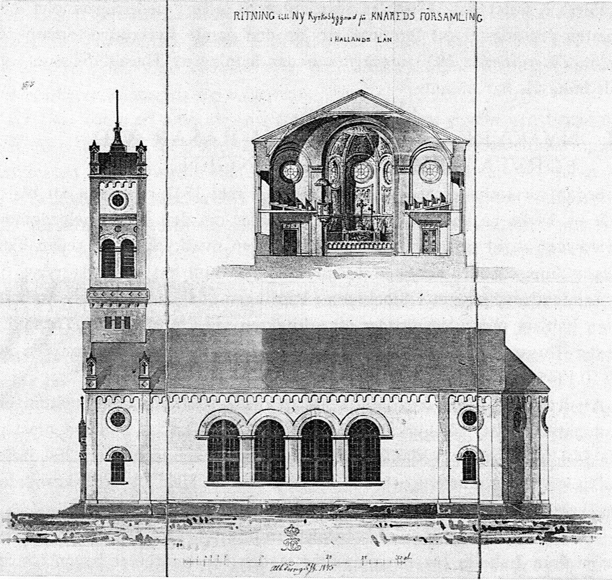 Knäreds kyrka. Drawing.